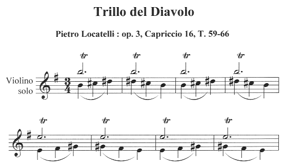 "Trillo del Diavolo" from Pietro Locatello: op. 3, Capriccio 16, bars 59-66